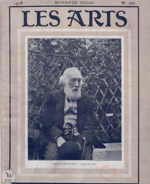 Degas en 1918. Revue Arts.